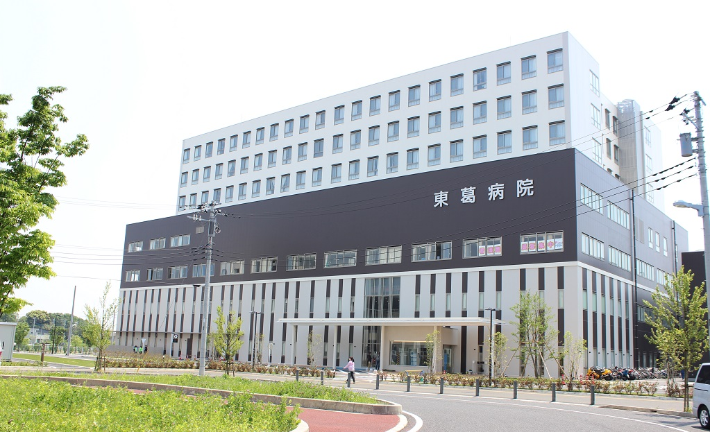 東葛病院 2015年5月 新病院移転